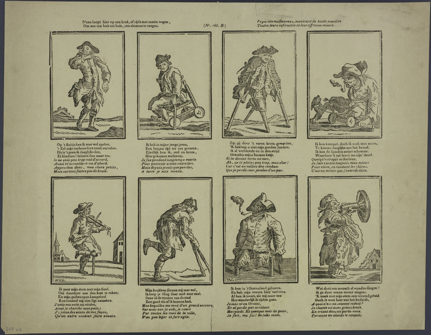 Oblong centsprent 2 x 4 omkaderde houtsneden met op de bovenste rij afbeeldingen van een fluitspeler, een man in een rolstoel, een invalide met twee houten benen en krukken, een kreupele man op een lage kar met een hondje, een kreupele vioolspeler/zanger (straatzanger), een man met krukken, een invalide man met pijp, een vrouw die in een toeter zingt. Bevat vierregelige rijmende onderschriften in Nederlands en Frans. Zie ook Beersmans 101